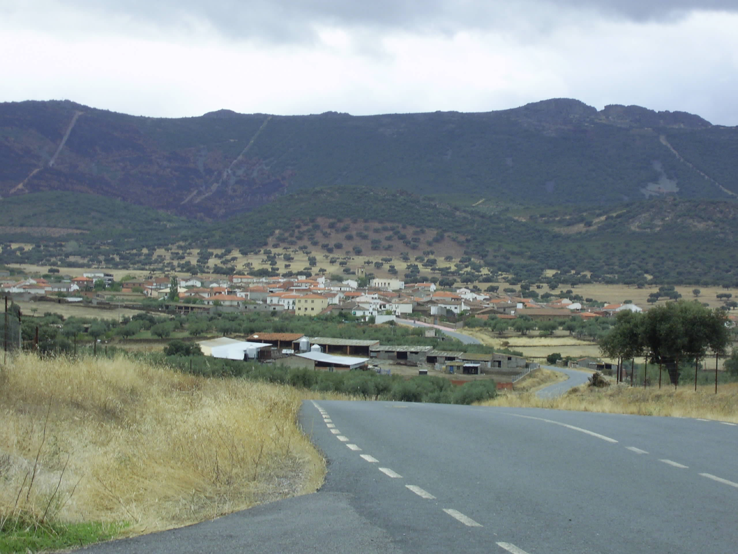 Entrada a Carrascalejo viniendo de Villar del Pedroso